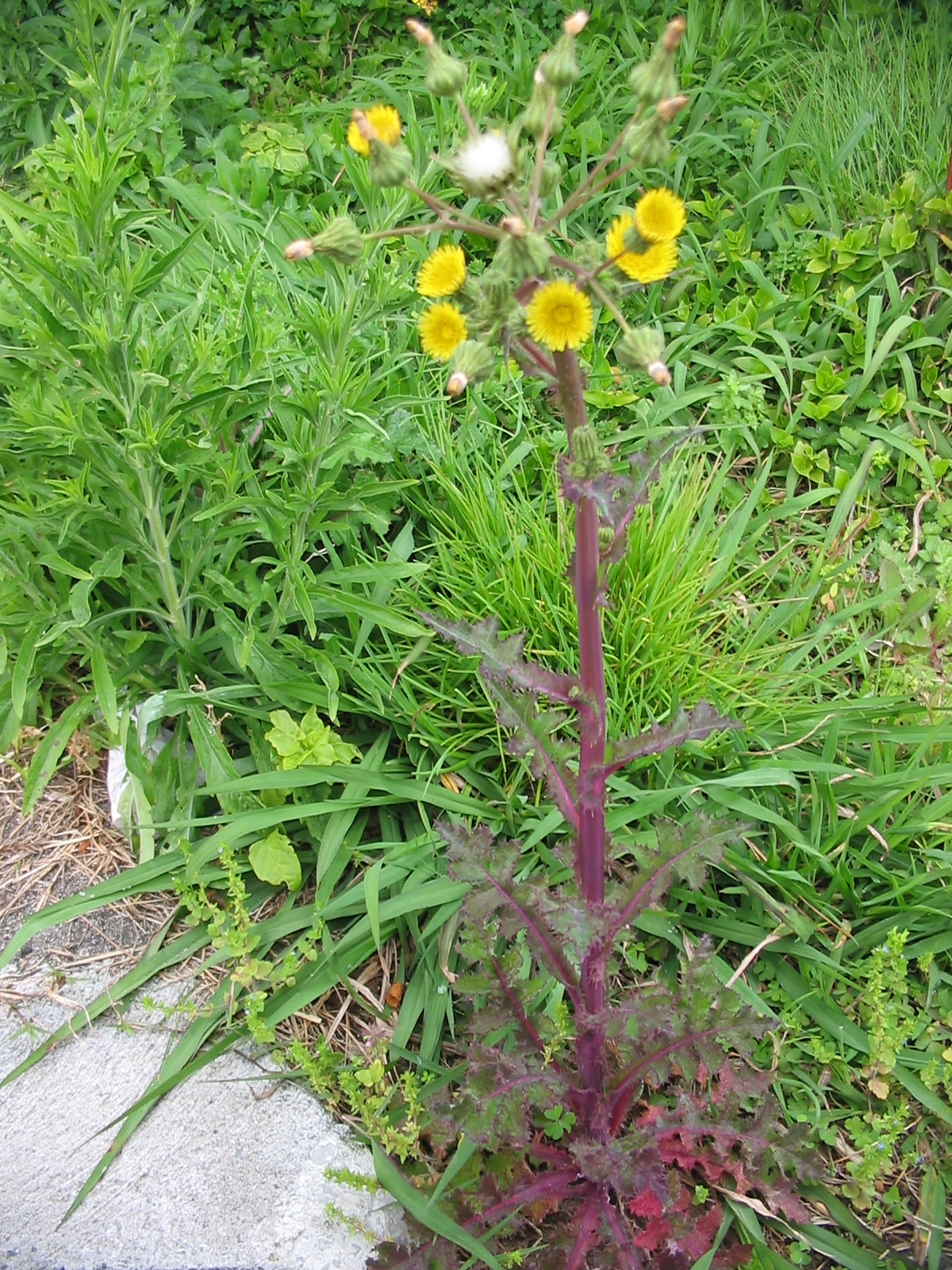 Gemüse-Gänsedistel (Sonchus oleraceus) - Habitus